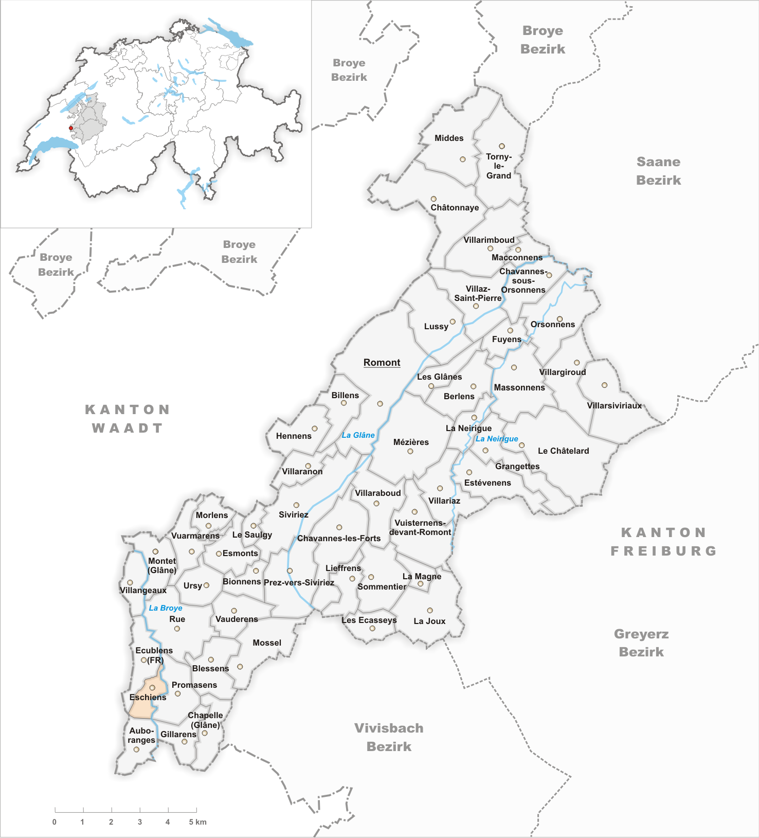 Municipality Eschiens Artist: Tschubby